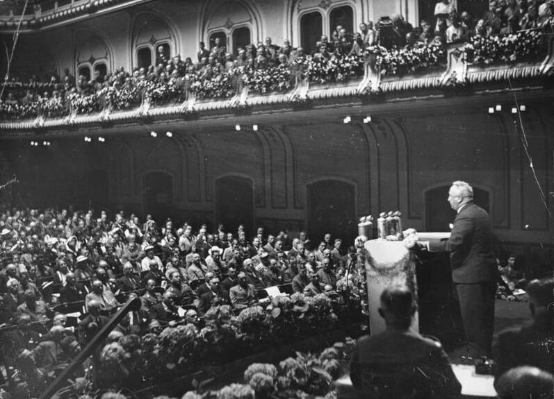 Hamburg, Freizeitweltkongress Scherl: Eröffnung des Weltkongresses für Freizeit und Erholung in der Musikhalle zu Hamburg. Reichsorganisationsleiter Dr. [Robert] Ley spricht. Phot. Wagner Abgebildete Personen: Ley, Robert: Reichsorganisationsleiter, Deutsche Arbeitsfront (DAF), Generalrat der Wirtschaft, Deutschland